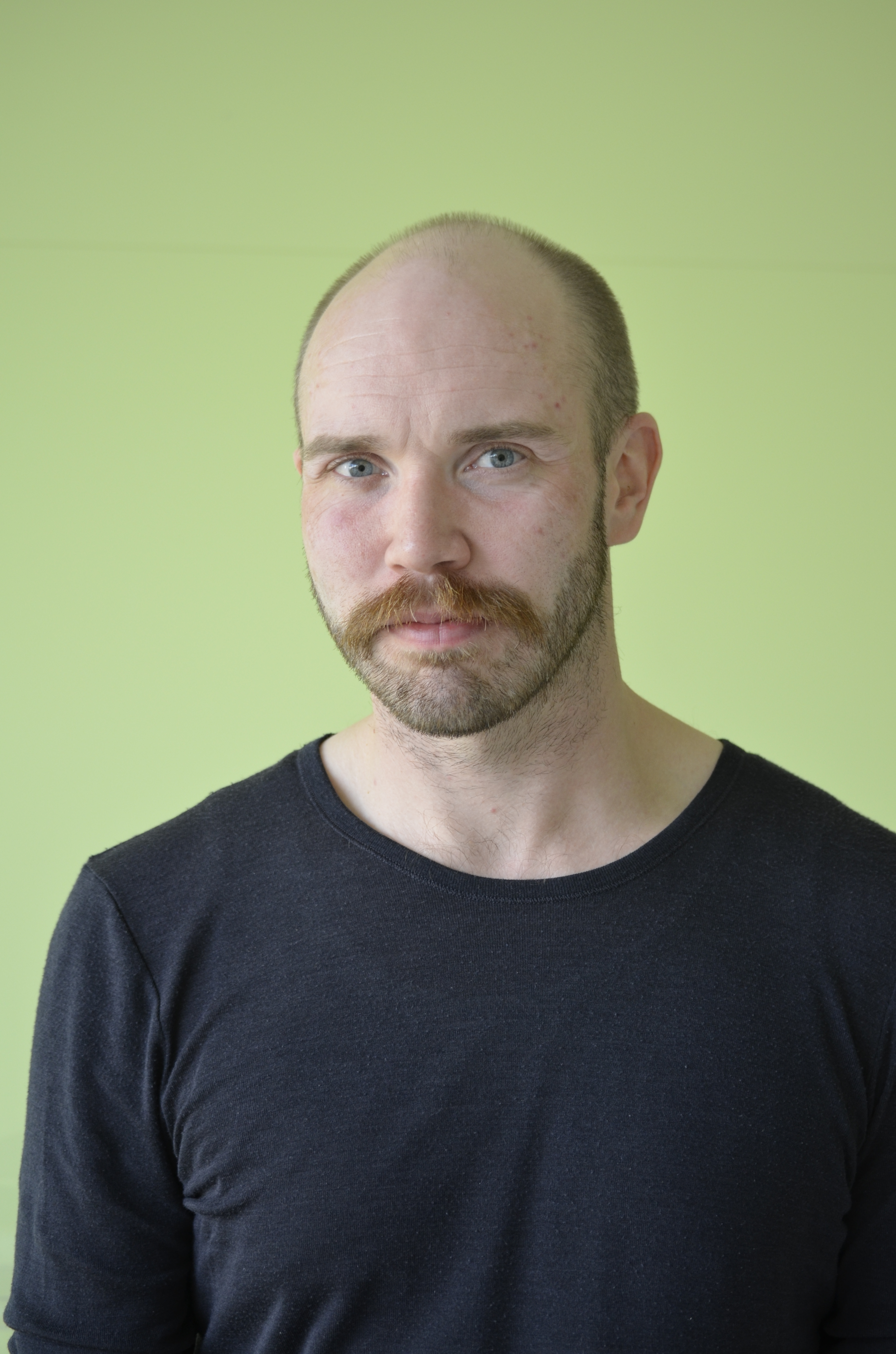 Kristofer Folkhammar Världskulturmuseet Göteborg 2017